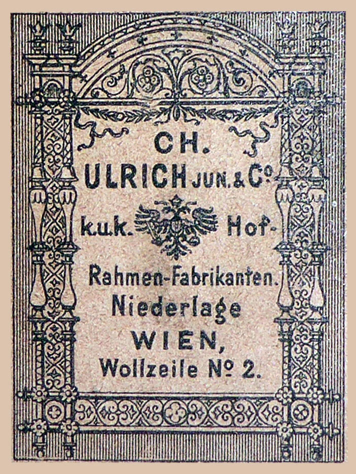 Firmenetikette, CH. Ulrich Jun. & Co., k.u.k. Hoflieferant